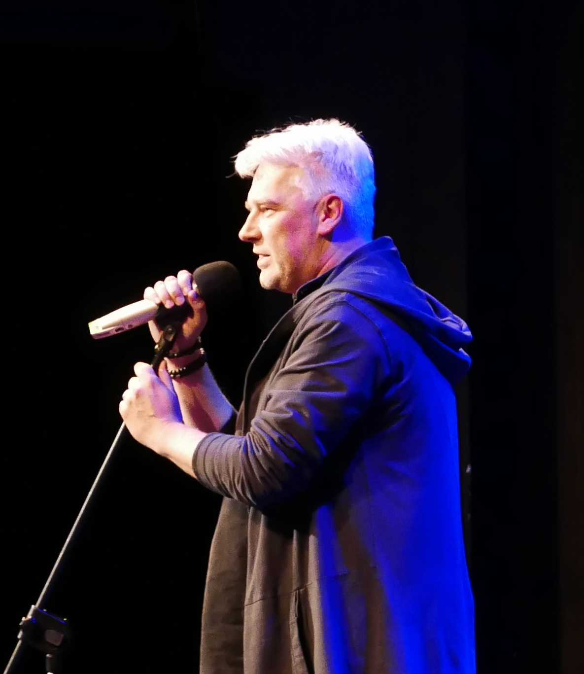 Zbigniew Stryj, aktor, 2018